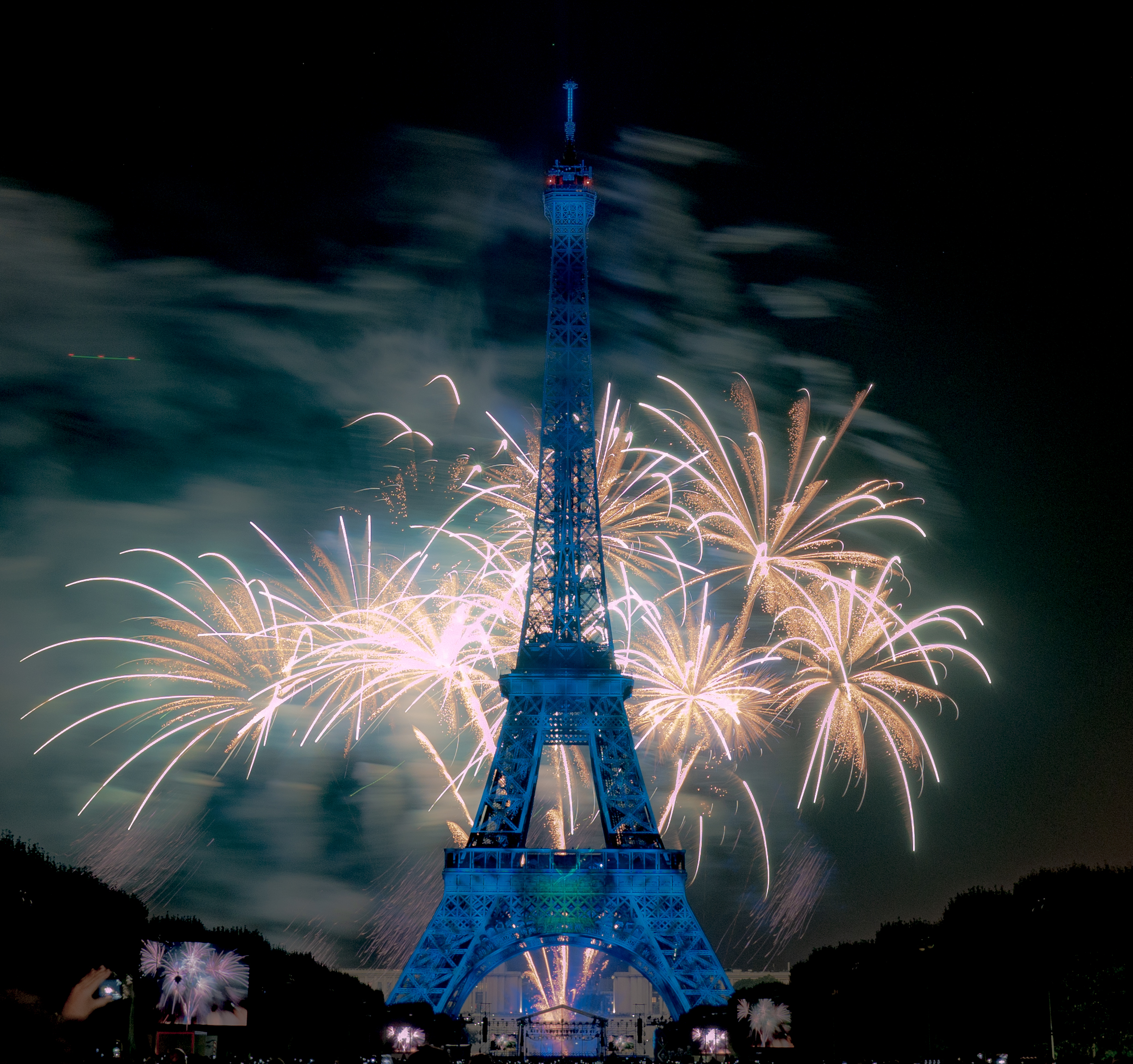 14 juillet 2018 - feu d'artifice de la fête nationale tirée depuis le champ de Mars à Paris par le Groupe F